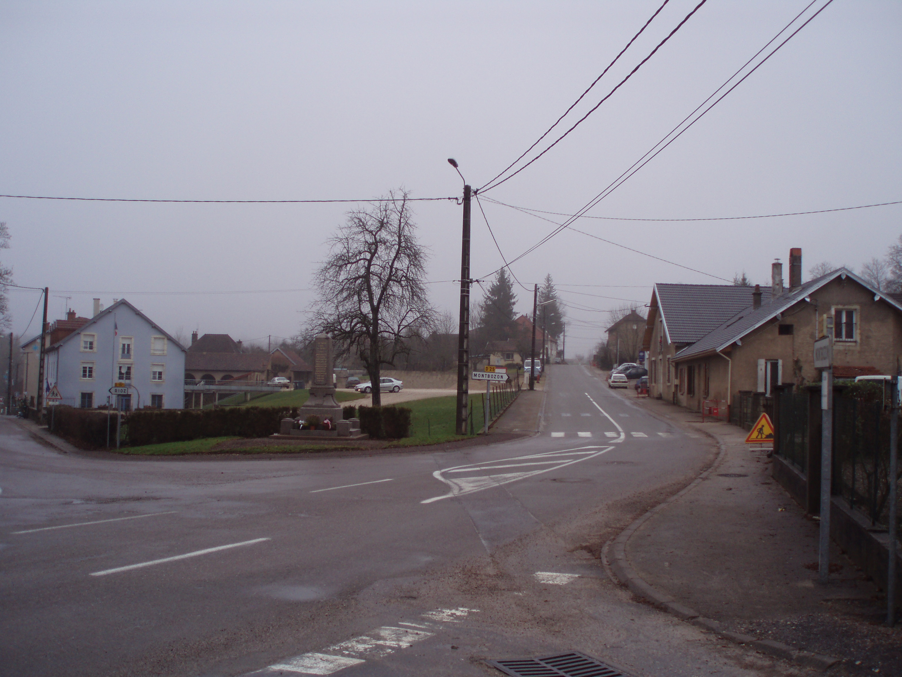 Le Monument - Loulans Verchamp - dec 2008